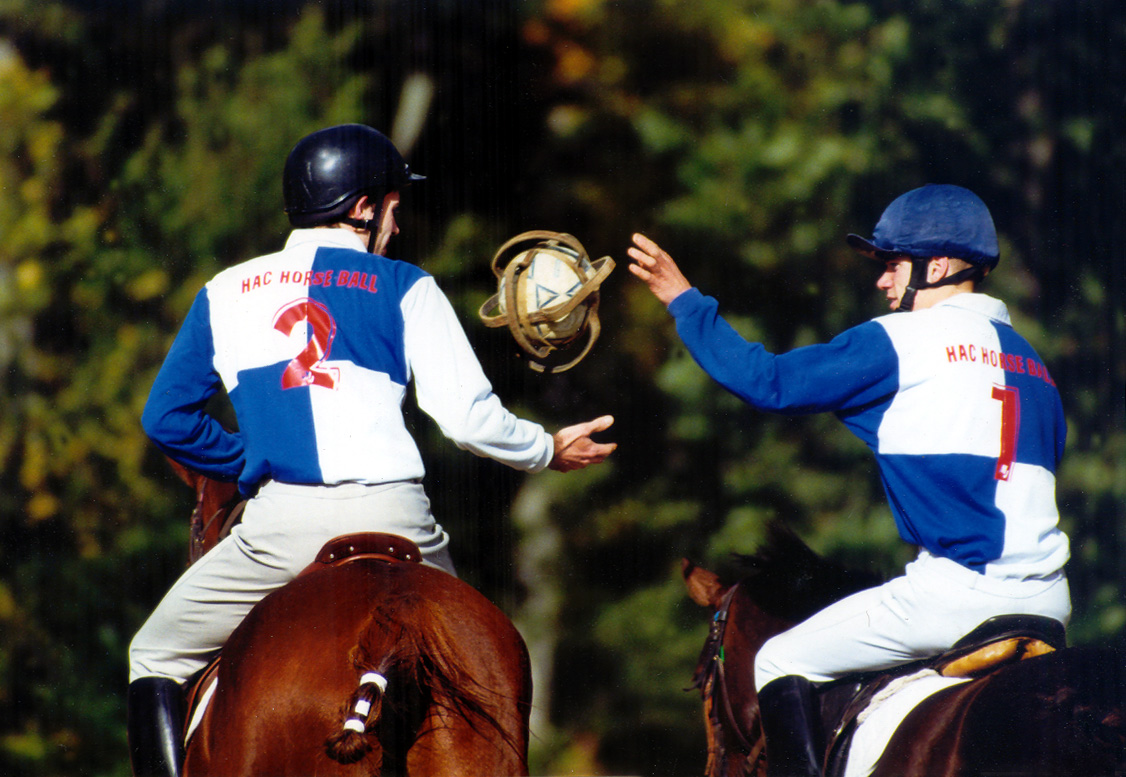 Horseball. Phase de jeu.